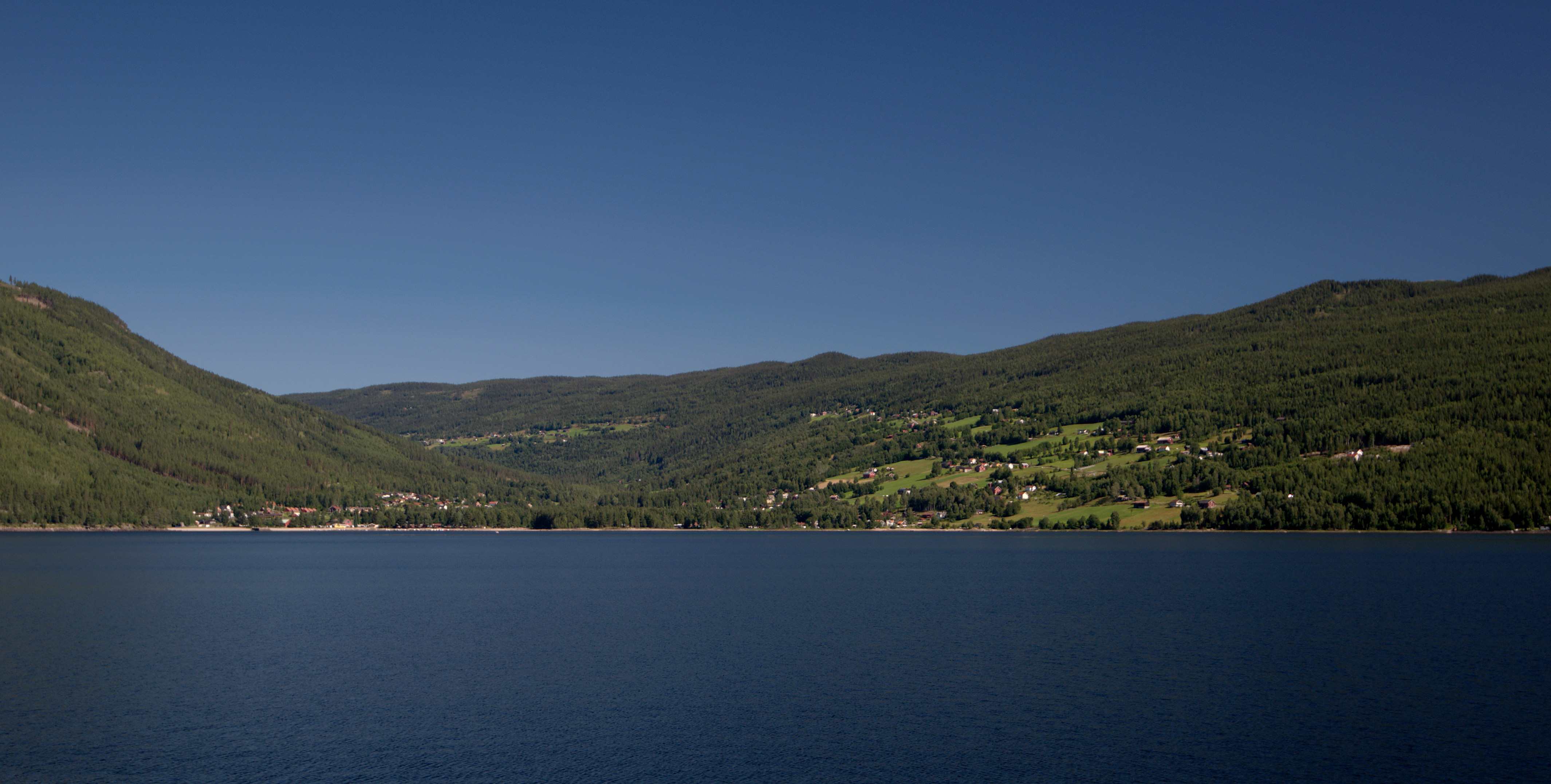 Tinn Austbygd in Tinn district